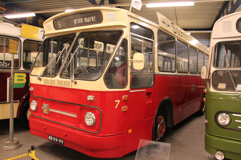 Museumbus van het Nationaal Bus Museum in Hoogezand.